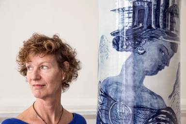 Saskia Pfaeltzer, naar links kijkend, bij een vaas met een blauwe figuur die naar rechts kijkt. This work is free and may be used by anyone for any purpose. If you wish to use this content, you do not need to request permission as long as you follow any licensing requirements mentioned on this page.